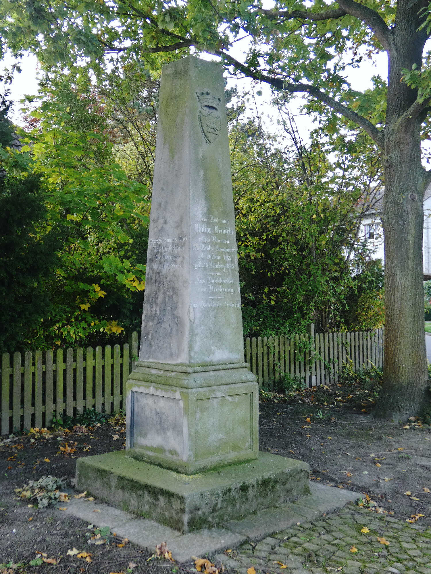 Das 1850 bei Linderte aufgestellte Amtmann-Reinecke-Denkmal ist ein Obelisk aus Wealdensandstein.